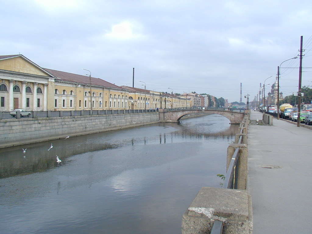 Обводный канал в Санкт-Петербурге вблизи Варшавского вокзала